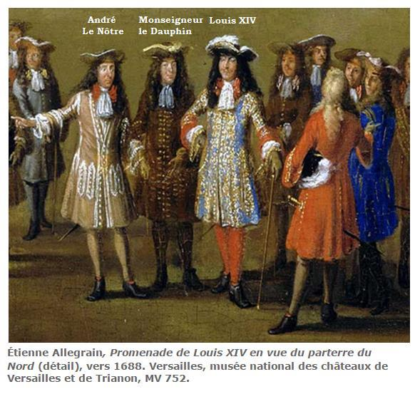 Légende d'un détail du tableau d'Etienne Allegrain montrant Louis XIV à Versailles. On reconnaît le roi, à sa droite son fils Monseigneur le Dauphin, et à côté André le Nôtre, jardinier du roi.